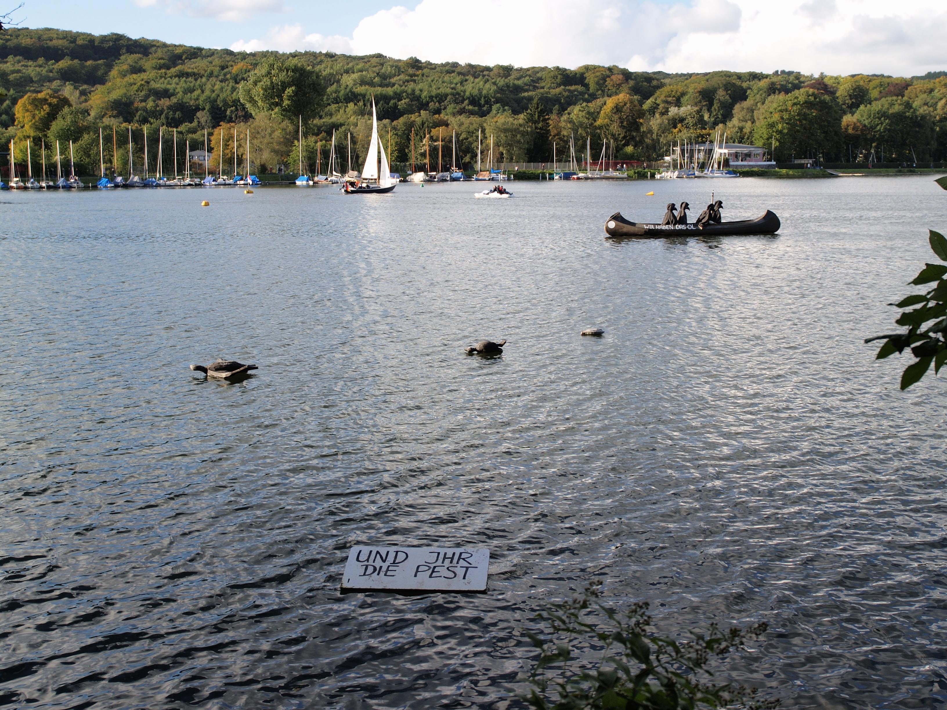 Kunstinstallation Wir haben das Öl auf dem Baldeneysee in Essen, im Rahmen der Ruhr.2010, installiert vom Kunstkreis Linse